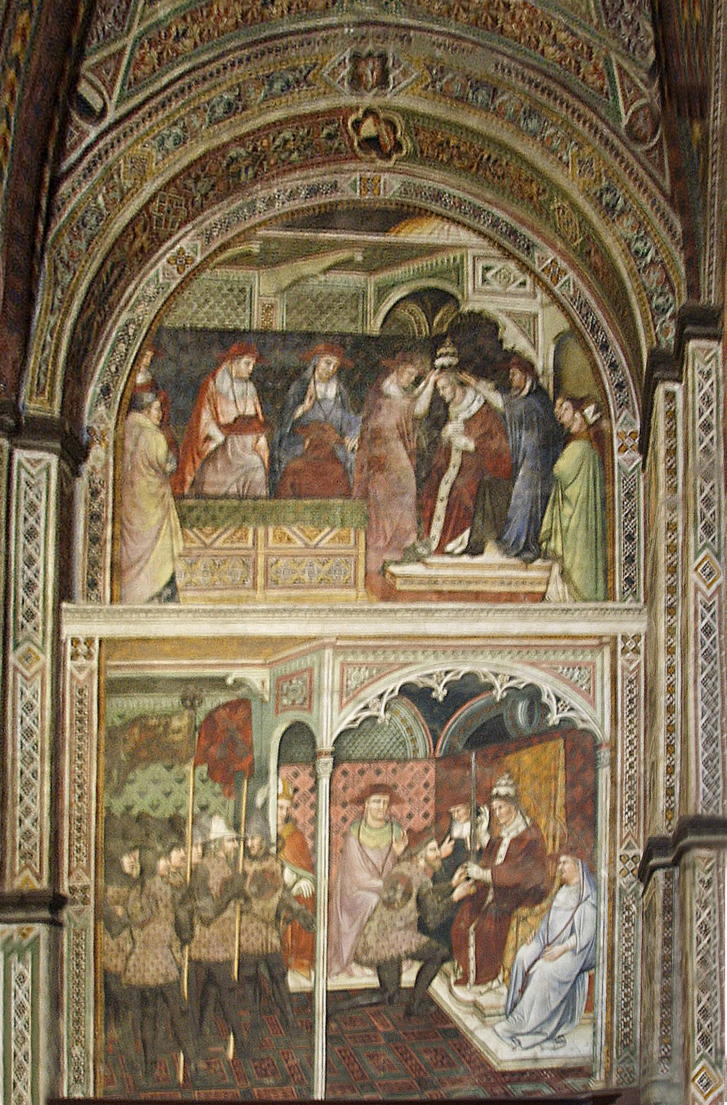 Fresque du Palais public de Sienne peinte par Spinello Aretino.